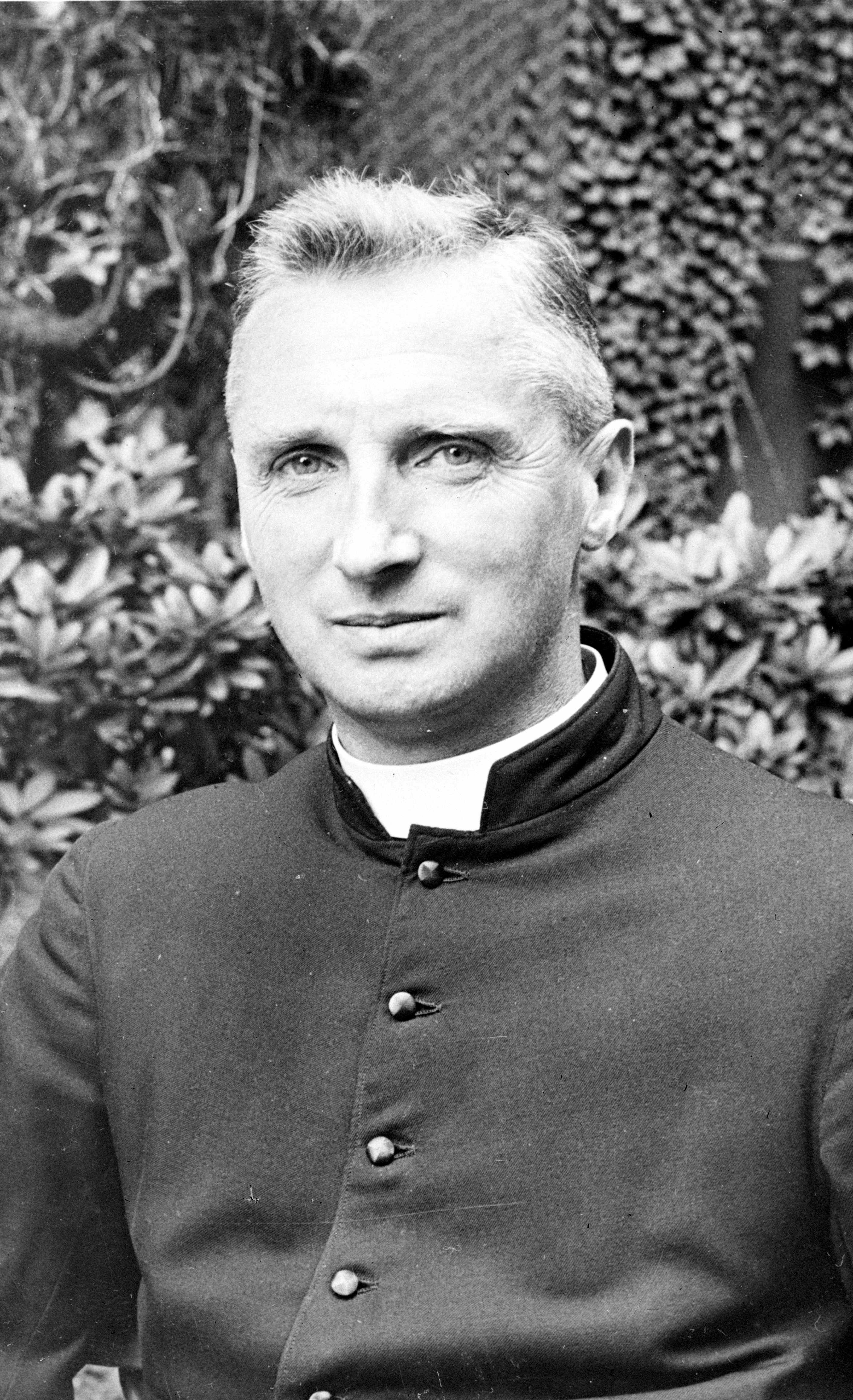 Robert Hubert Willem Regout (Maastricht, 18 januari 1896 – Dachau, 28 december 1942)